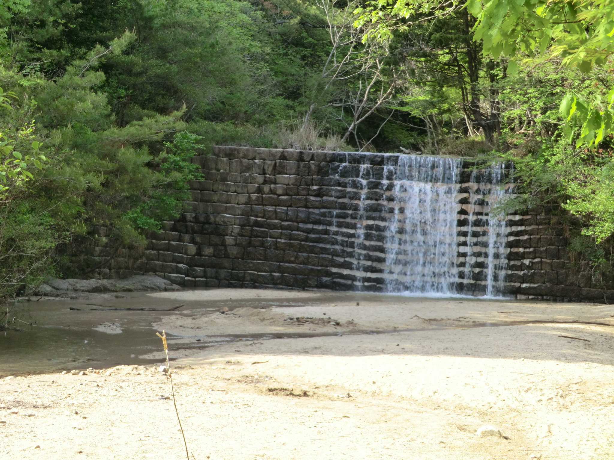 オランダ堰堤。日本の産業遺産300選。滋賀県大津市上田上にある。 明治時代にオランダ人技師デレーケが指導を行ったと考えられている。設計者は田辺義三郎技師。「日本の産業遺産300選3」に「本体の完成年は明治22年（1889年）頃と考えられる」と記載あり。